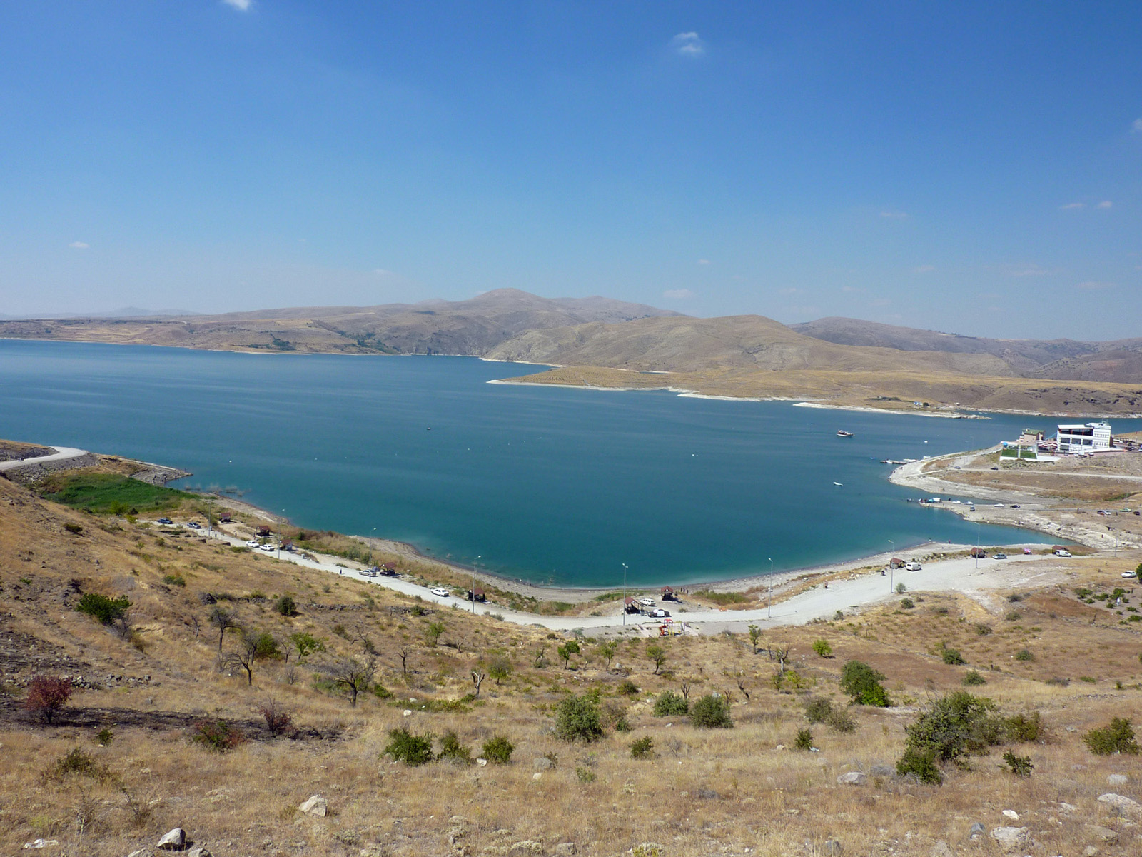 Yamula Barajı Kayseri